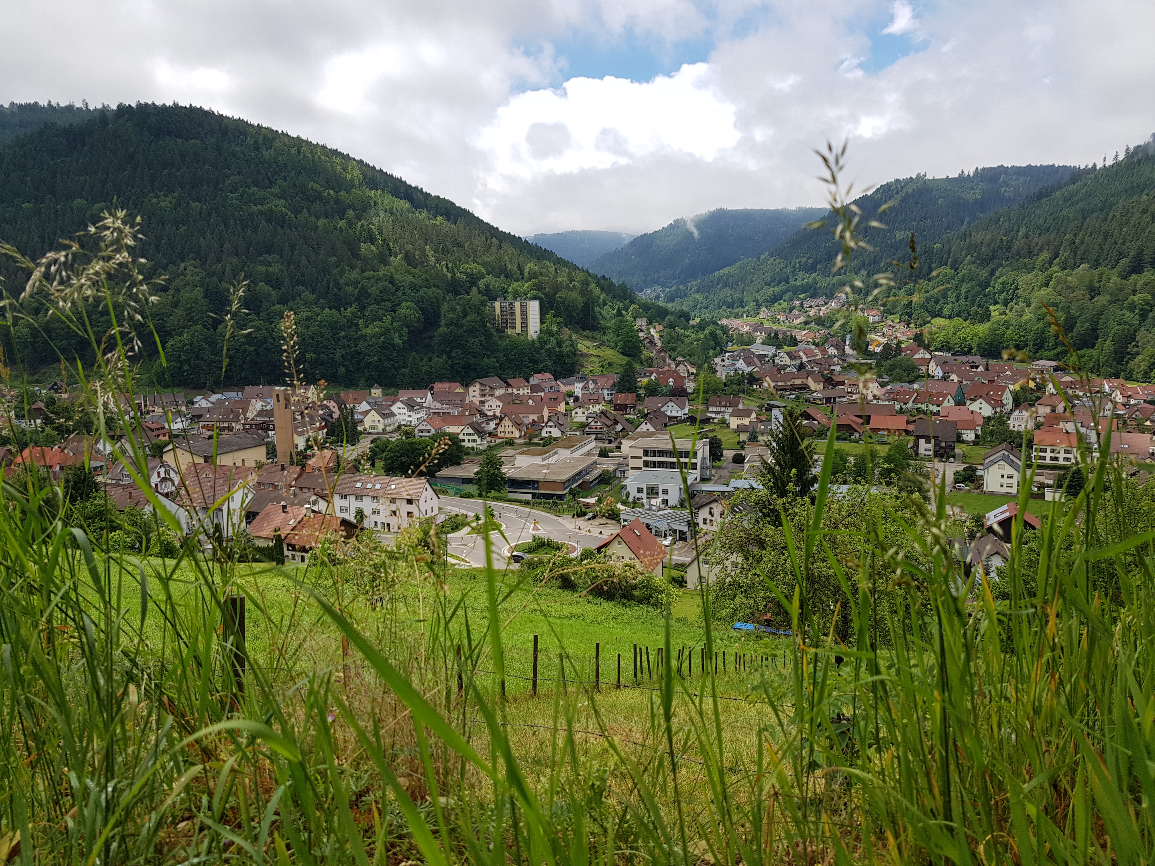 Schöne Ansicht auf den 5 Tälerort Calmbach